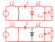 Cuk bihurgailuaren zirkuitu baliokideak